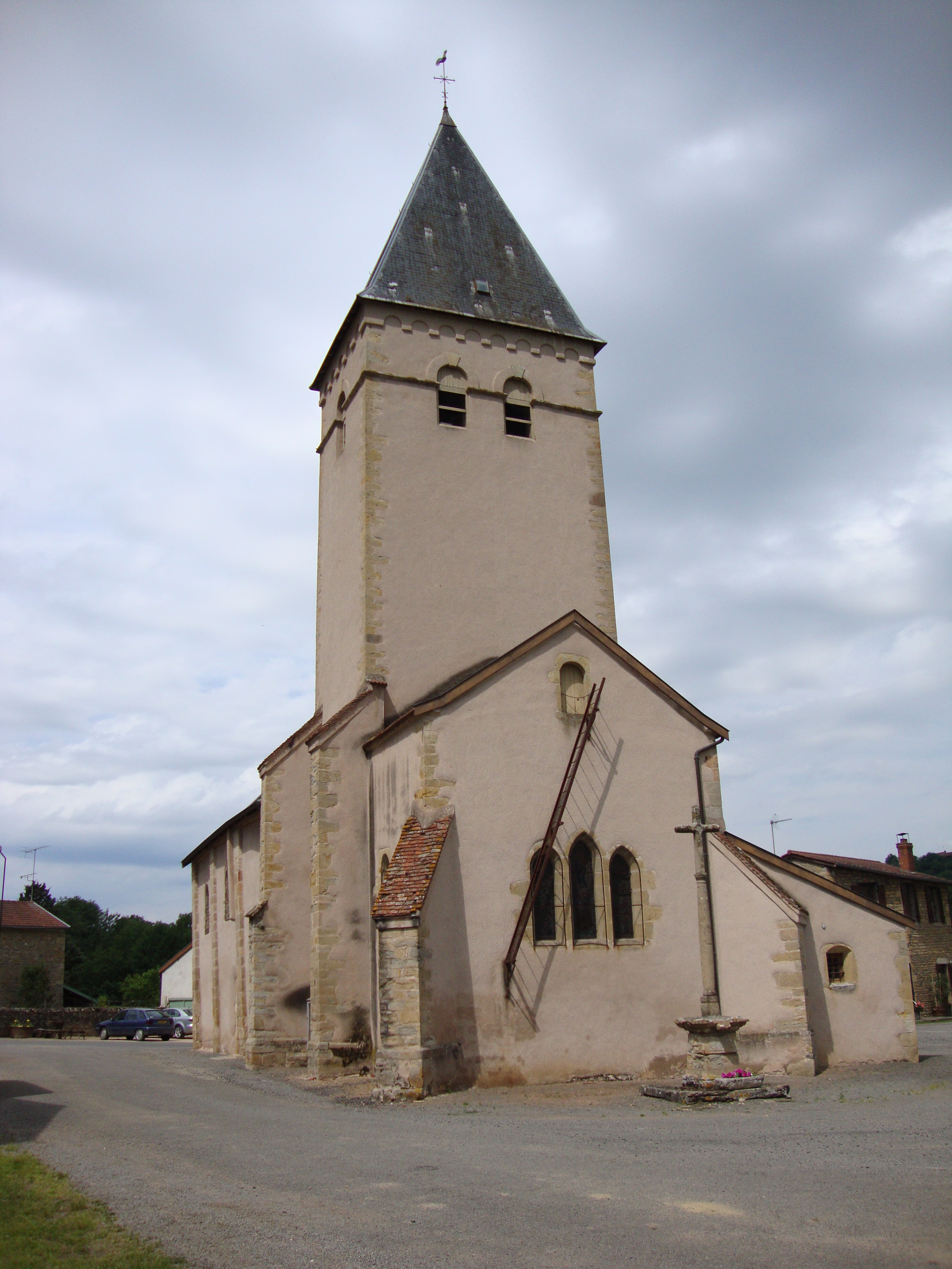 Clermain (Saône-et-Loire, Fr) église